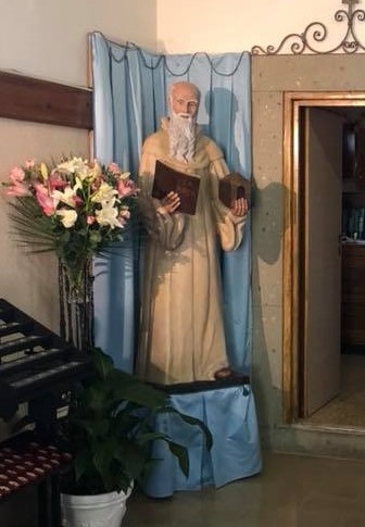 statua di san romualdo a roma